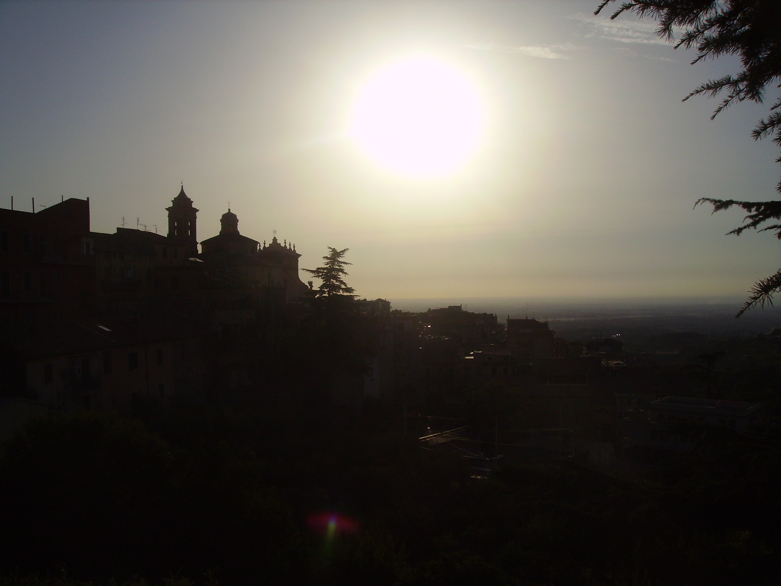 Marino da Piazzale degli Eroi